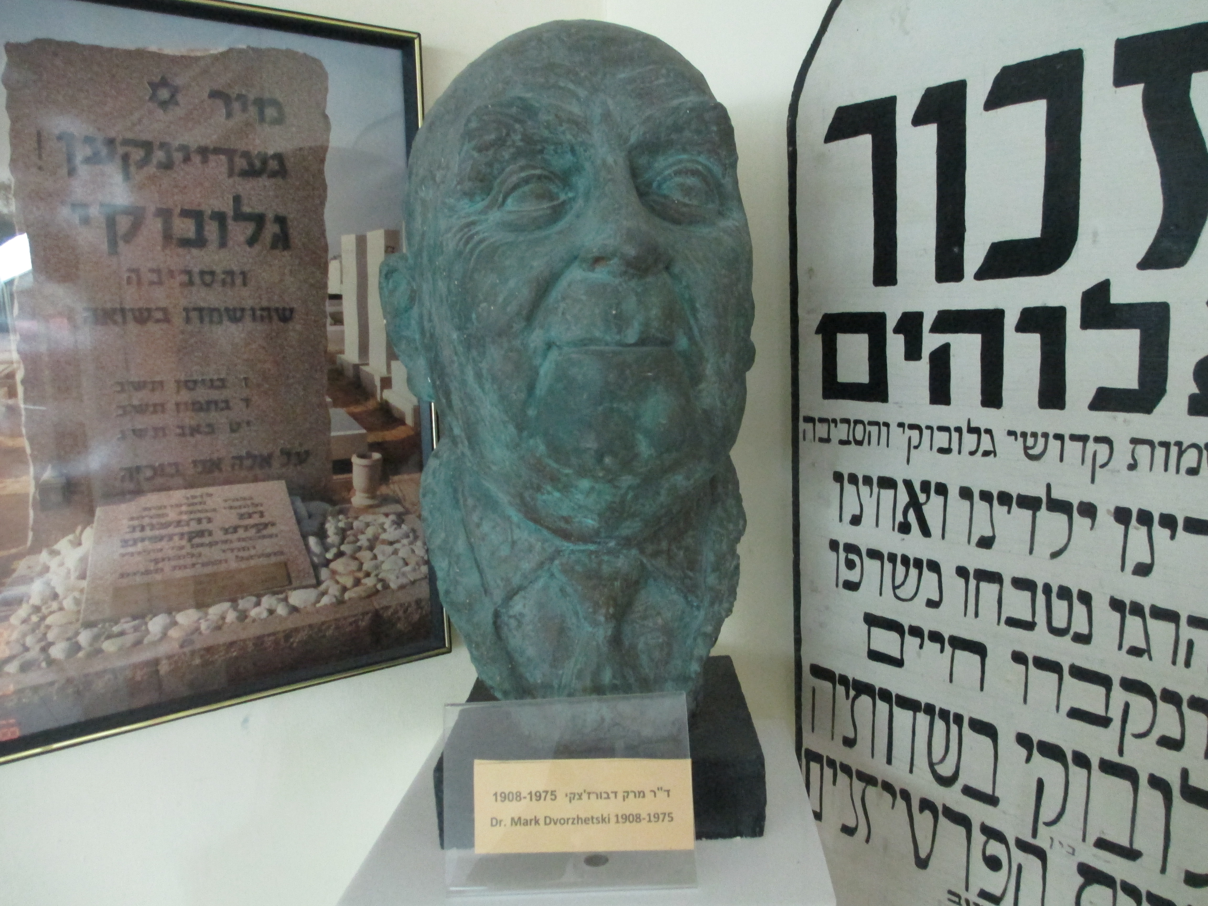 פסל של מארק דבורז'צקי בבית וילנה בתל אביב